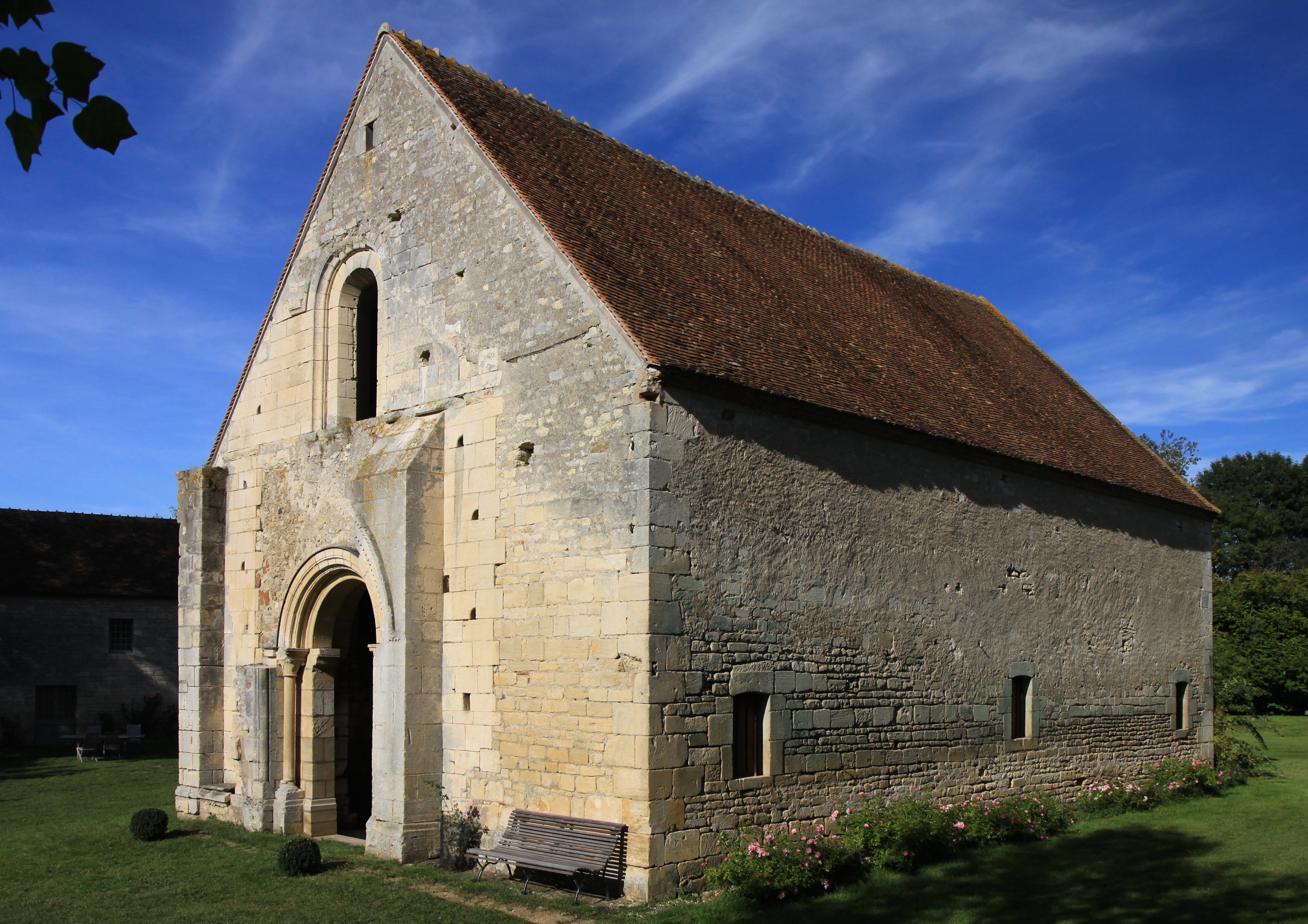 Chapelle de la commanderie des Templiers de Villemoison datée du 12ème siècle, située dans le département de la Nièvre.